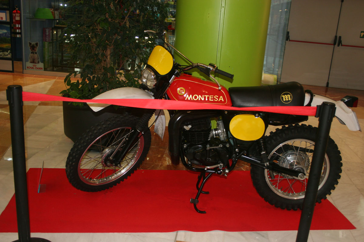 Montesa Enduro 360 H6, by 1978. 349,60 cc.